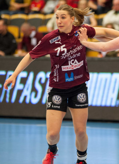 Anna Lagerquist, LUGI